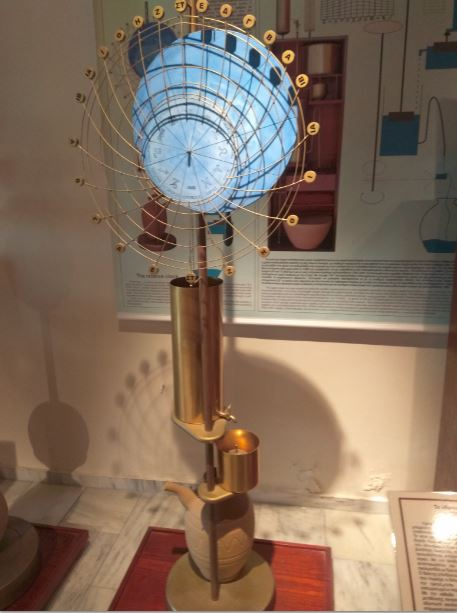 תצוגה של שעון הידראולי ששימש למיפוי מצב הכוכבים בשמיים